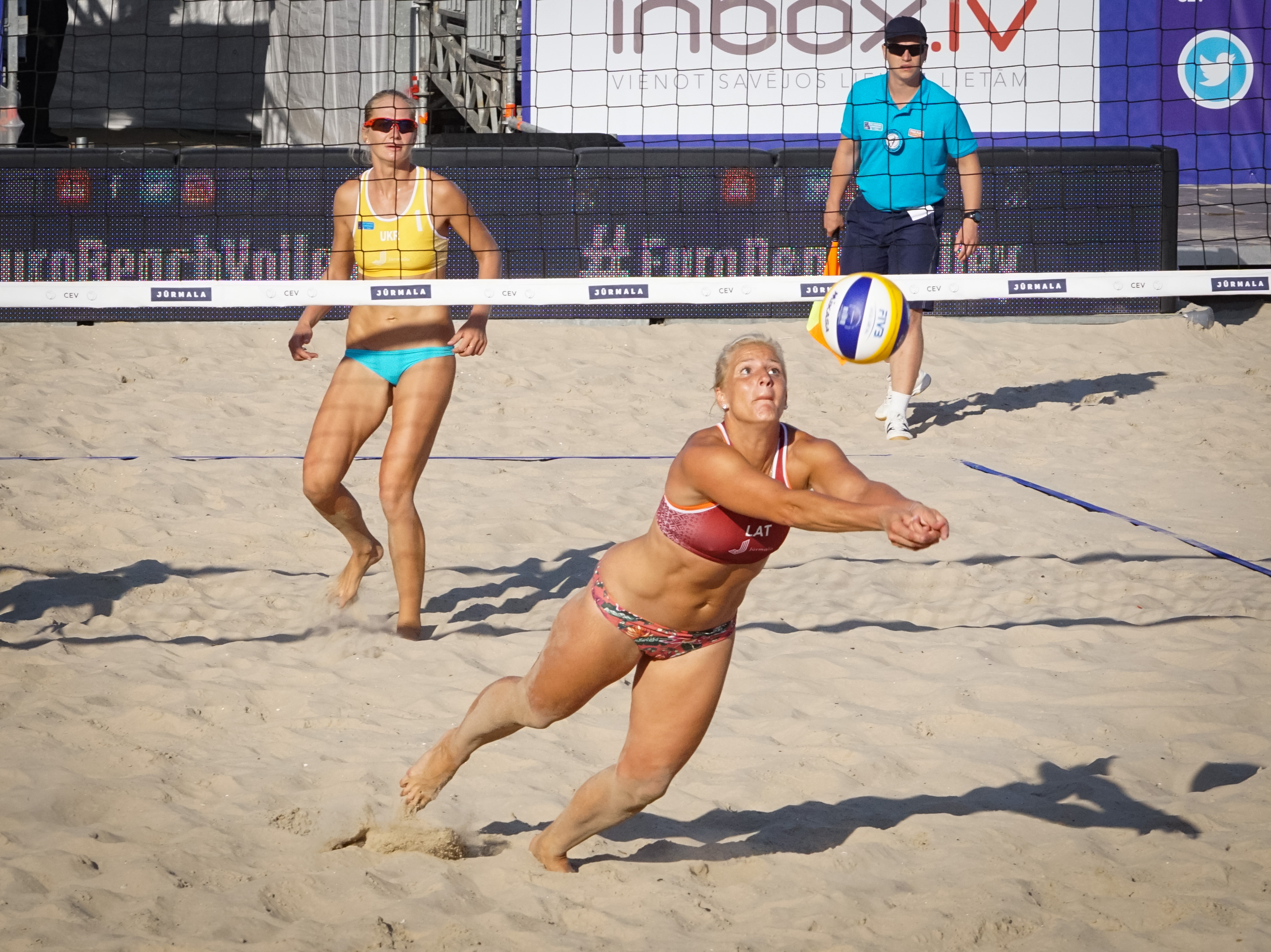 Inese Jursone - Latvijas pludmales volejbola spēlētāja, viena no godalgotākajām sportistēm, kas 2019.gadā izcīnījusi uzvaru Eiropas volejbola konfederācijas (CEV) Eiropas čempionātā.